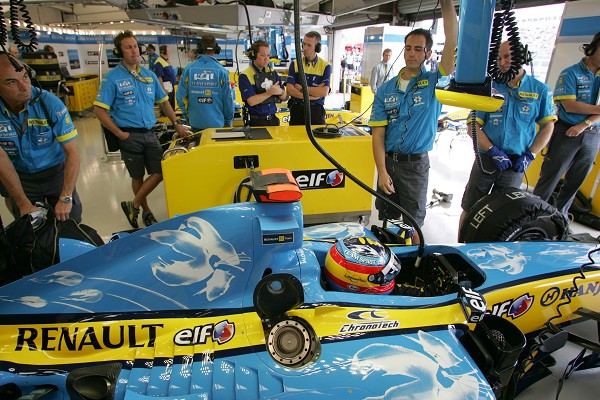 Fernando Alonso im Cockpit seines Renaults, Garage der Boxengasse, 2005, GP von Großbritannien05 Renault JP